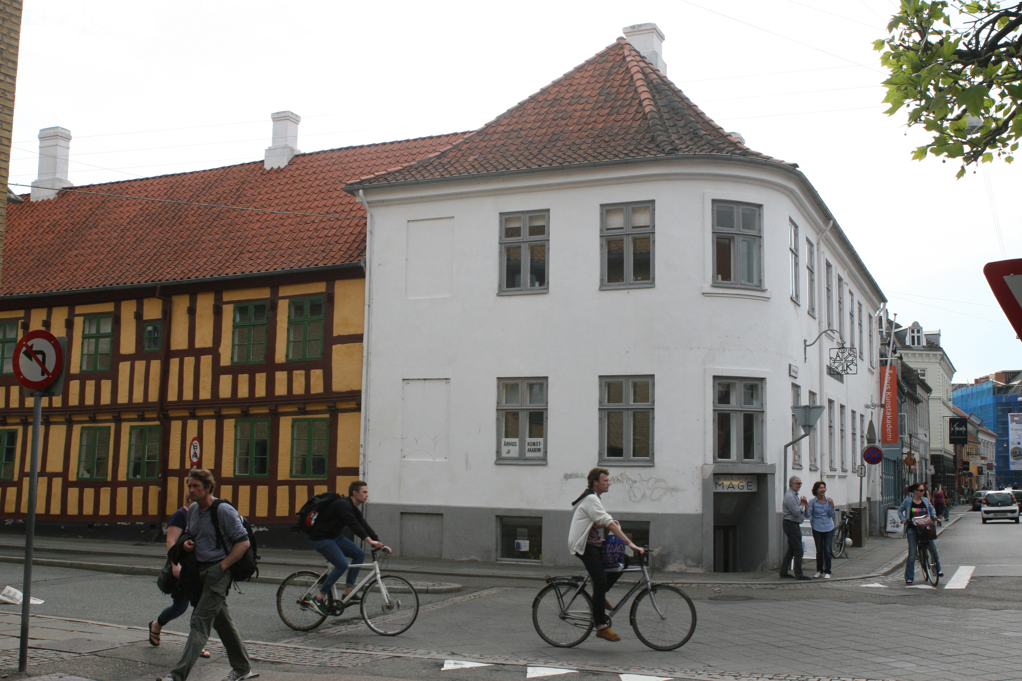 Århus Kunstakademi